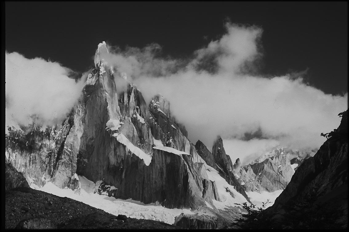 Cerro Torre, Patagonia